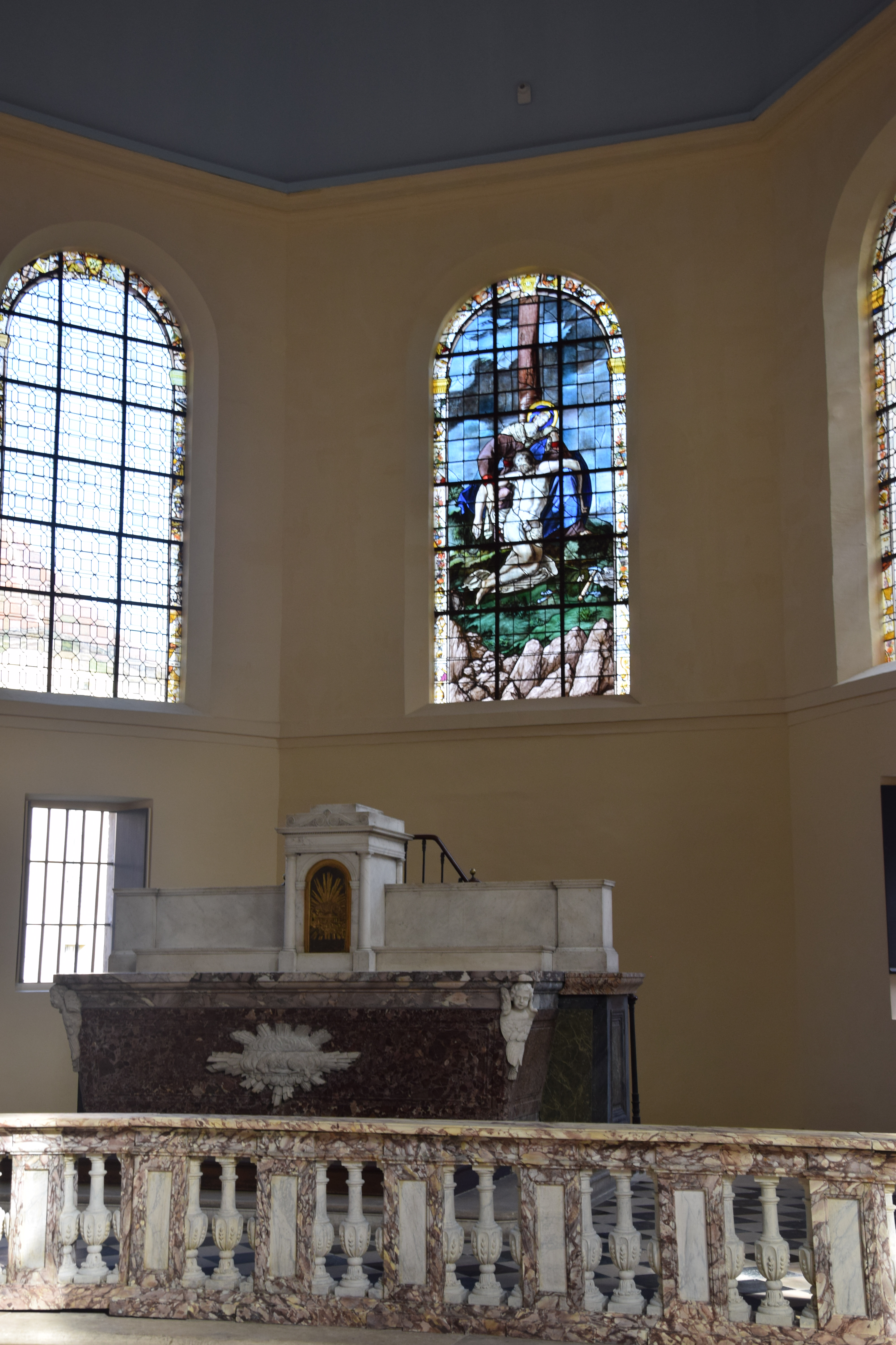 Chapelle de l'hôpital Laënnec de Paris, maître-autel et tabernacle.